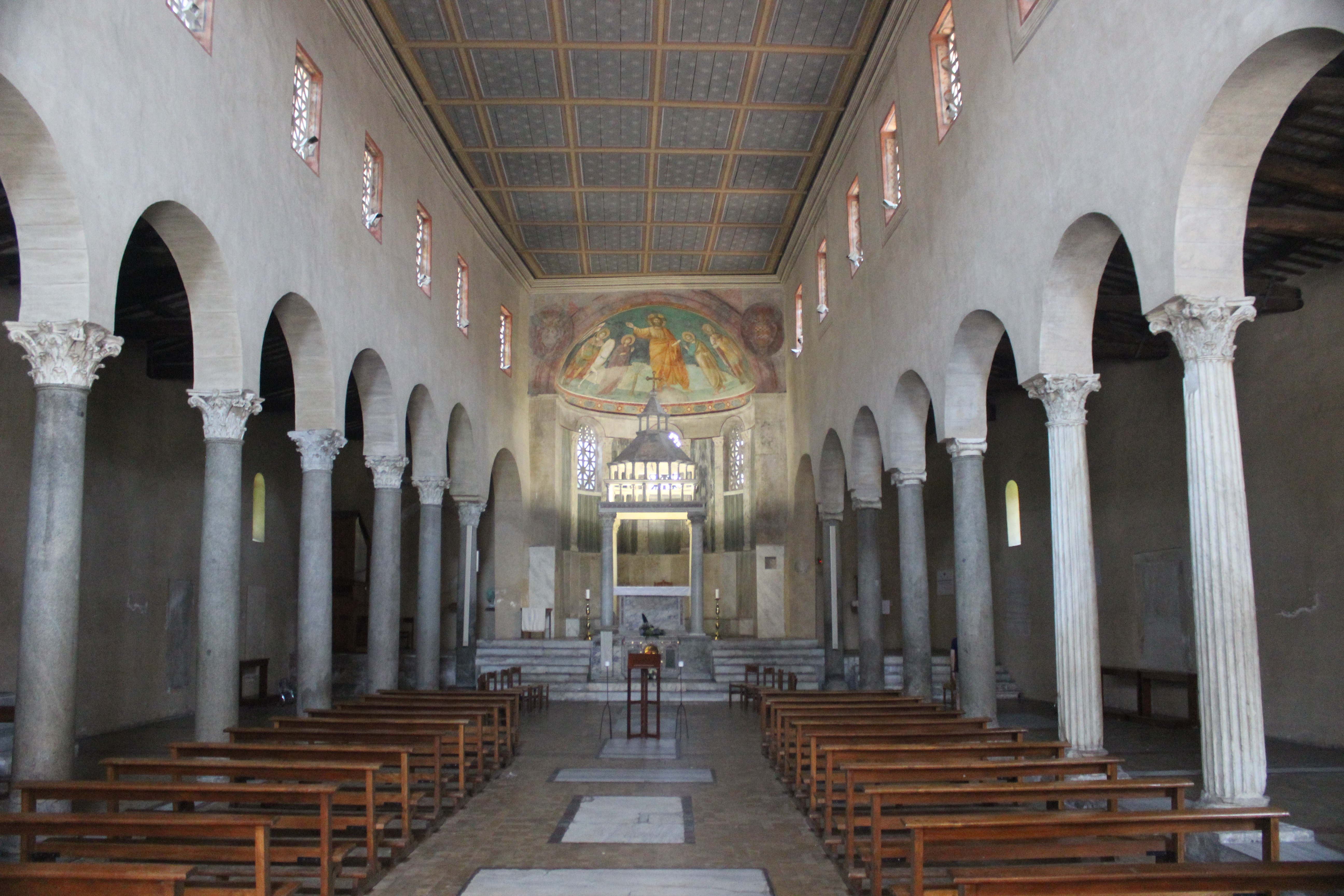 Roma. San Giorgio in Velabro. Interior.